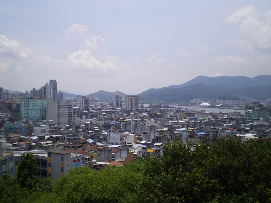 נוף במקאו רישיון נוצר על ידי משתמש:Gsella